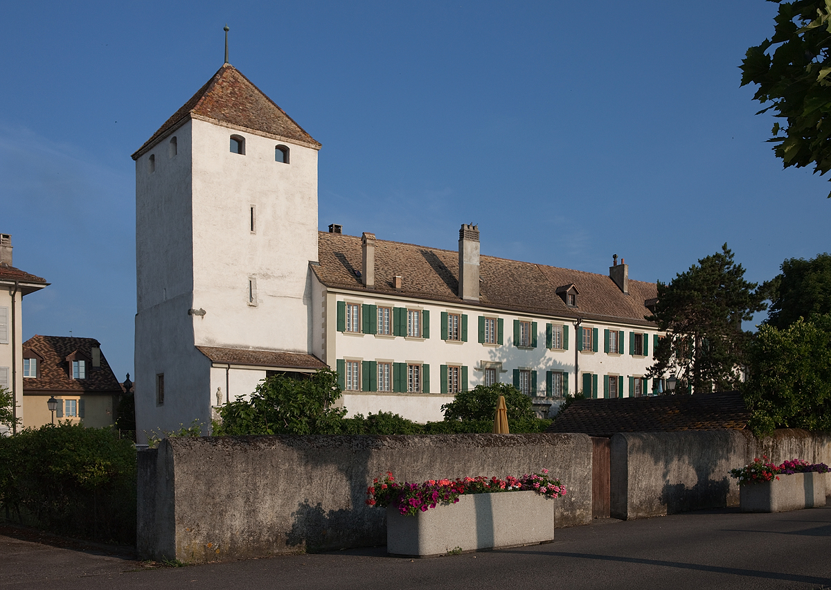 Le Château du St-Prex